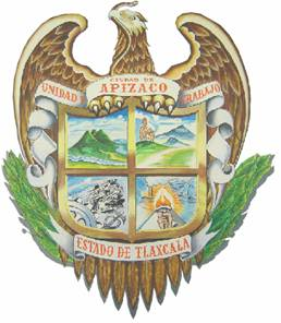 Escudo de la ciudad de Apizaco